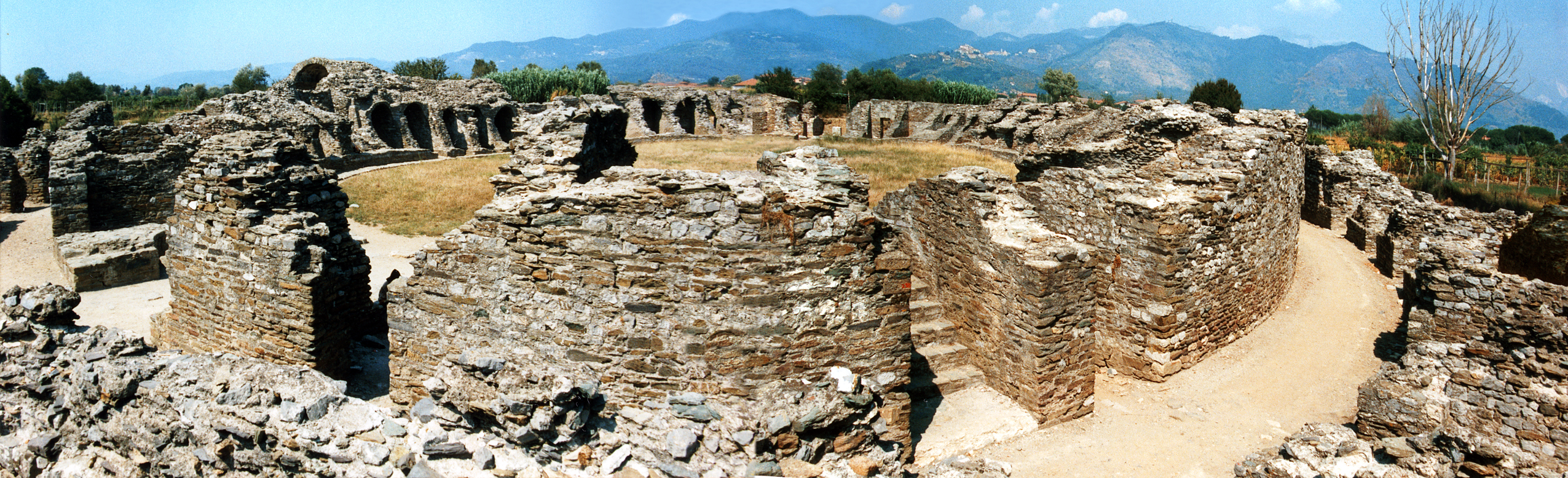 Das Amphitheater von Luna, Provinz Toscana, Italien. Aus zwei Aufnahmen montiert.